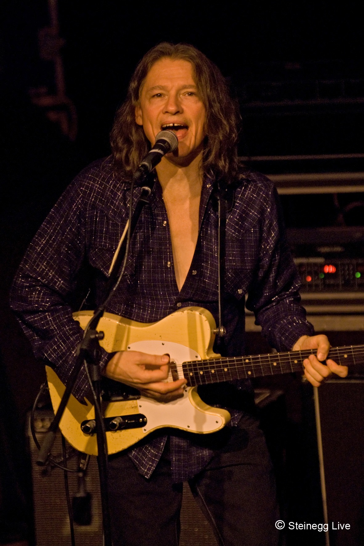 Robben Ford beim Steinegg Live Festival 2008